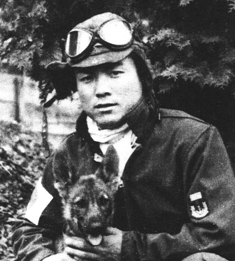 1945年、筑波空時代の伊藤清。